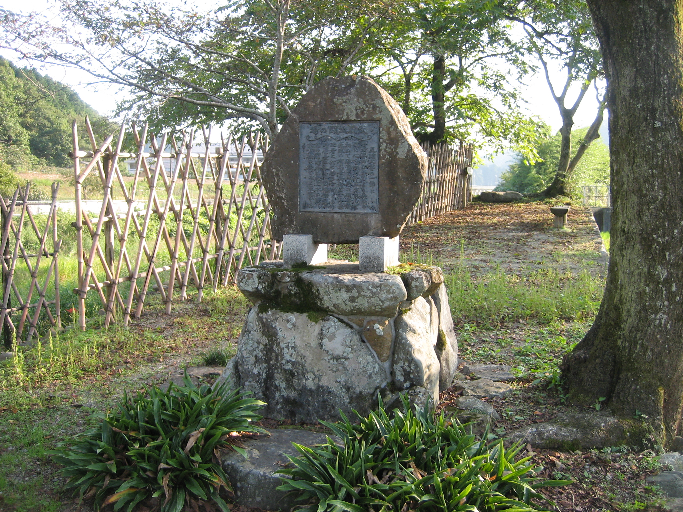 宮本武蔵の決闘の地を記念して建てられたと思われる石碑。